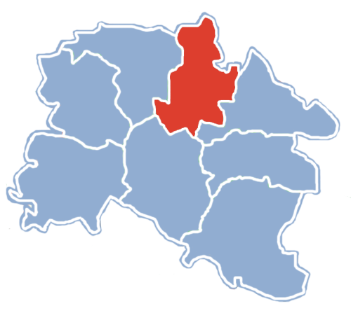 Położenie gminy Rząśnia na mapie powiatu pajęczańskiego.